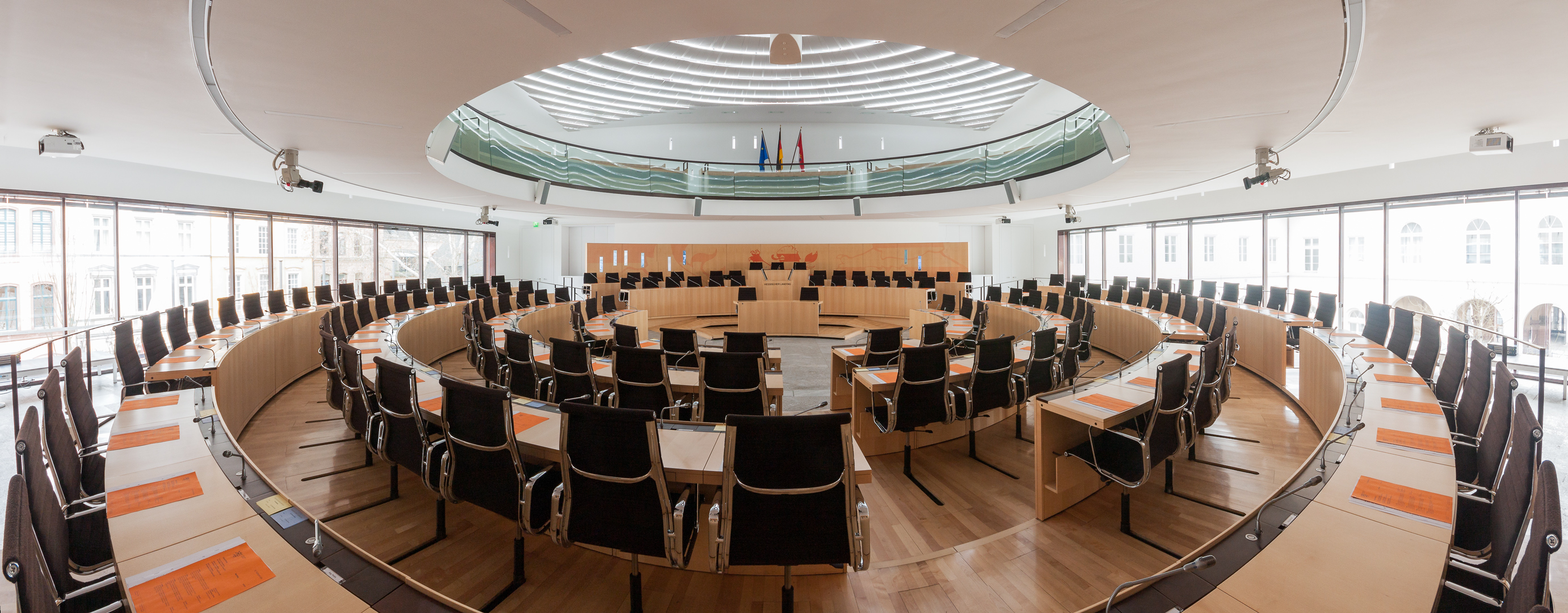 Leerer Plenarsaal des Hessischen Landtags